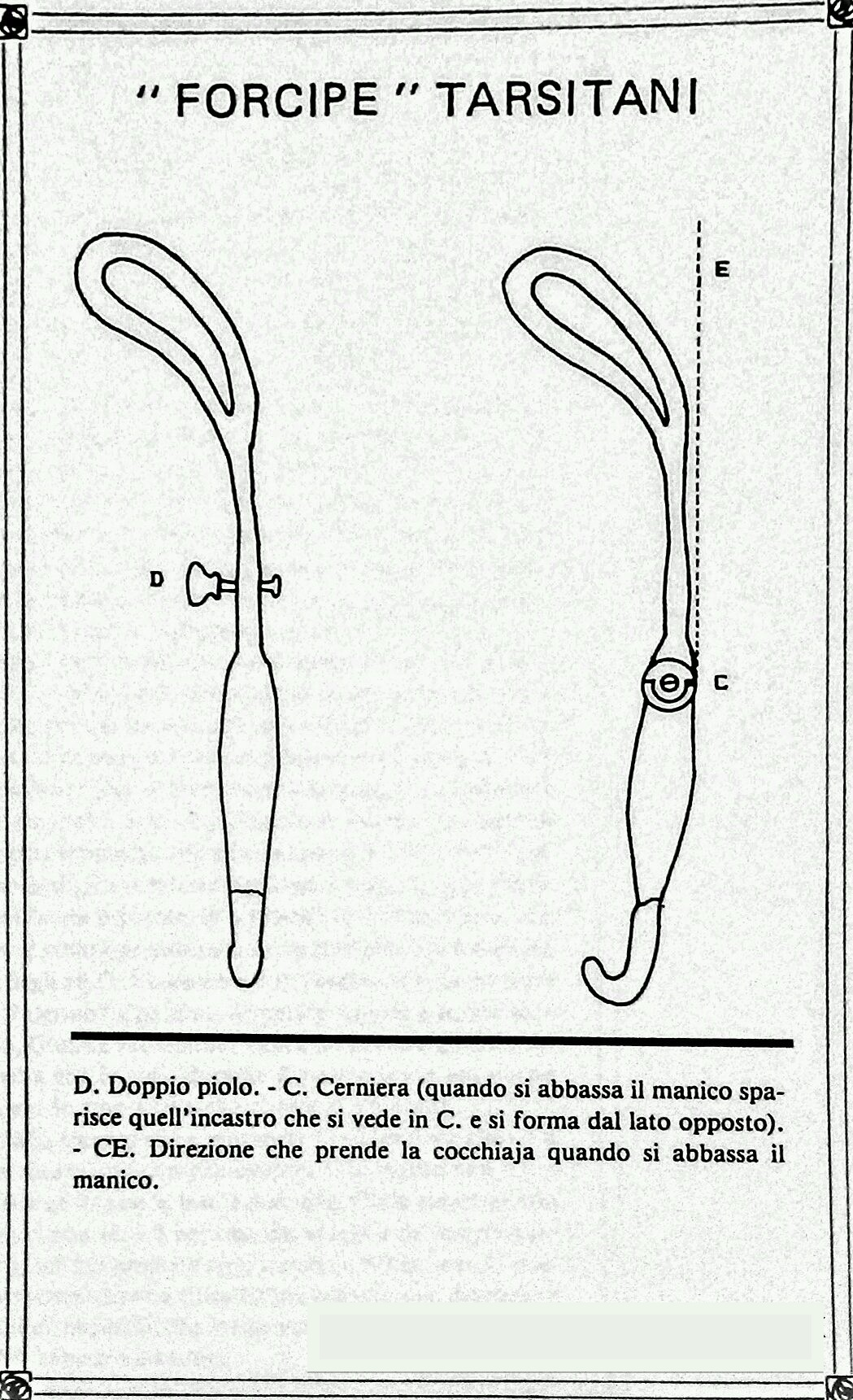 Foto della forcipe di Domenico Tarsitani